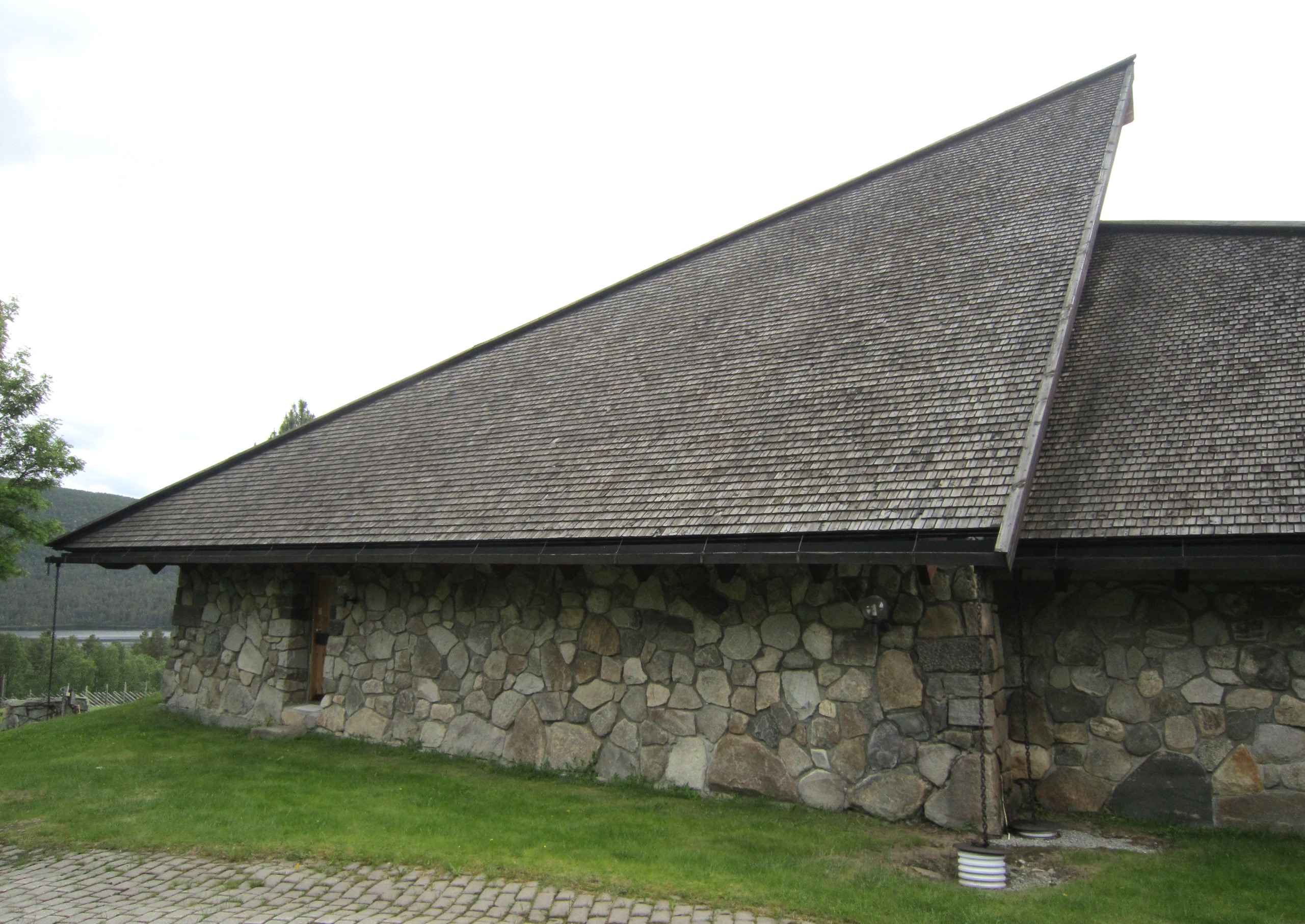 Skurdalen kirke (Hol kommune, Buskerud)